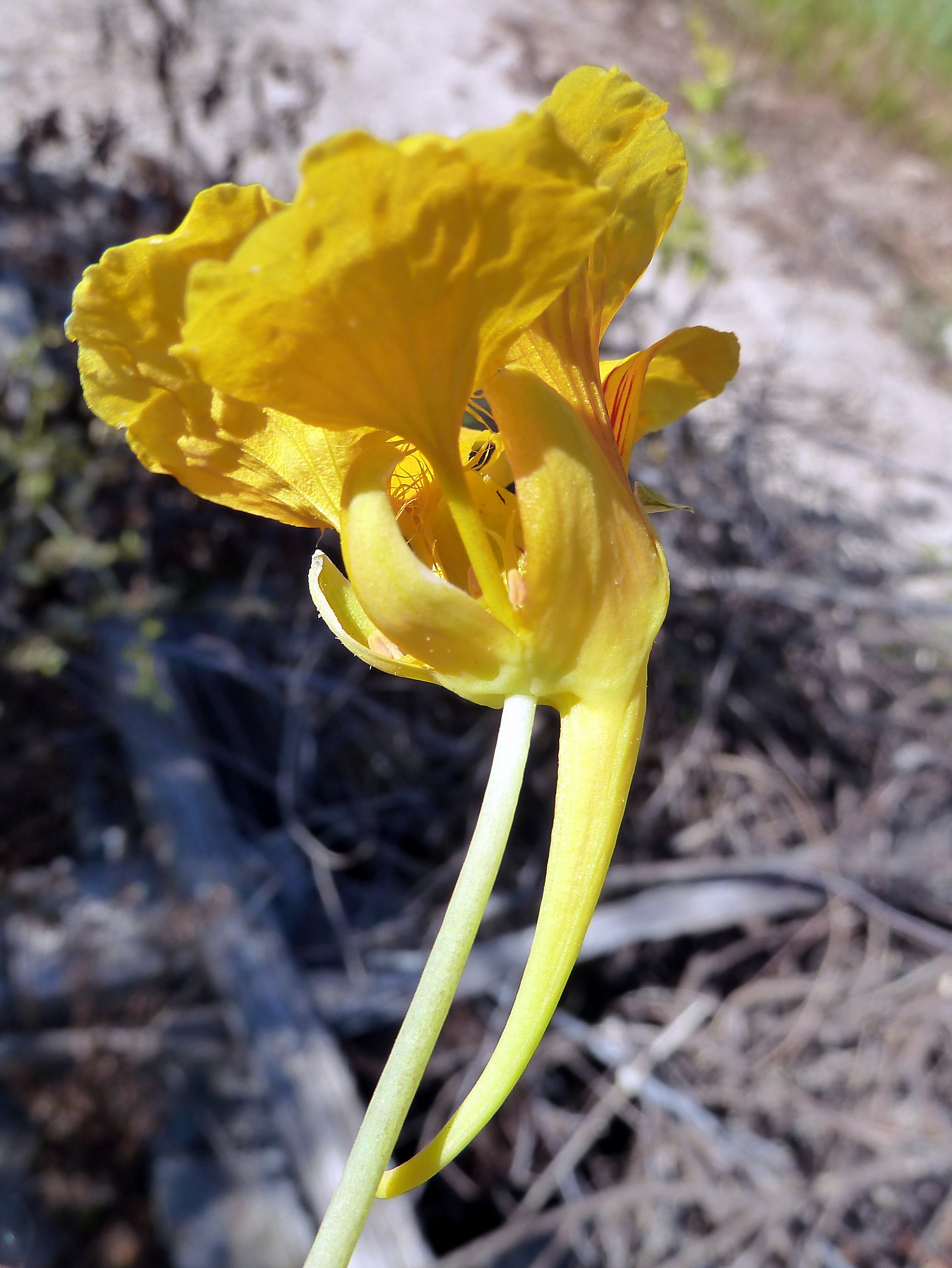 Tropaeolum majus (Capuchina) - Vista lateral. Cultivado/ornamental, Camino de la Azarbe de Patricio, Albatera (Provincia de Alicante, España).